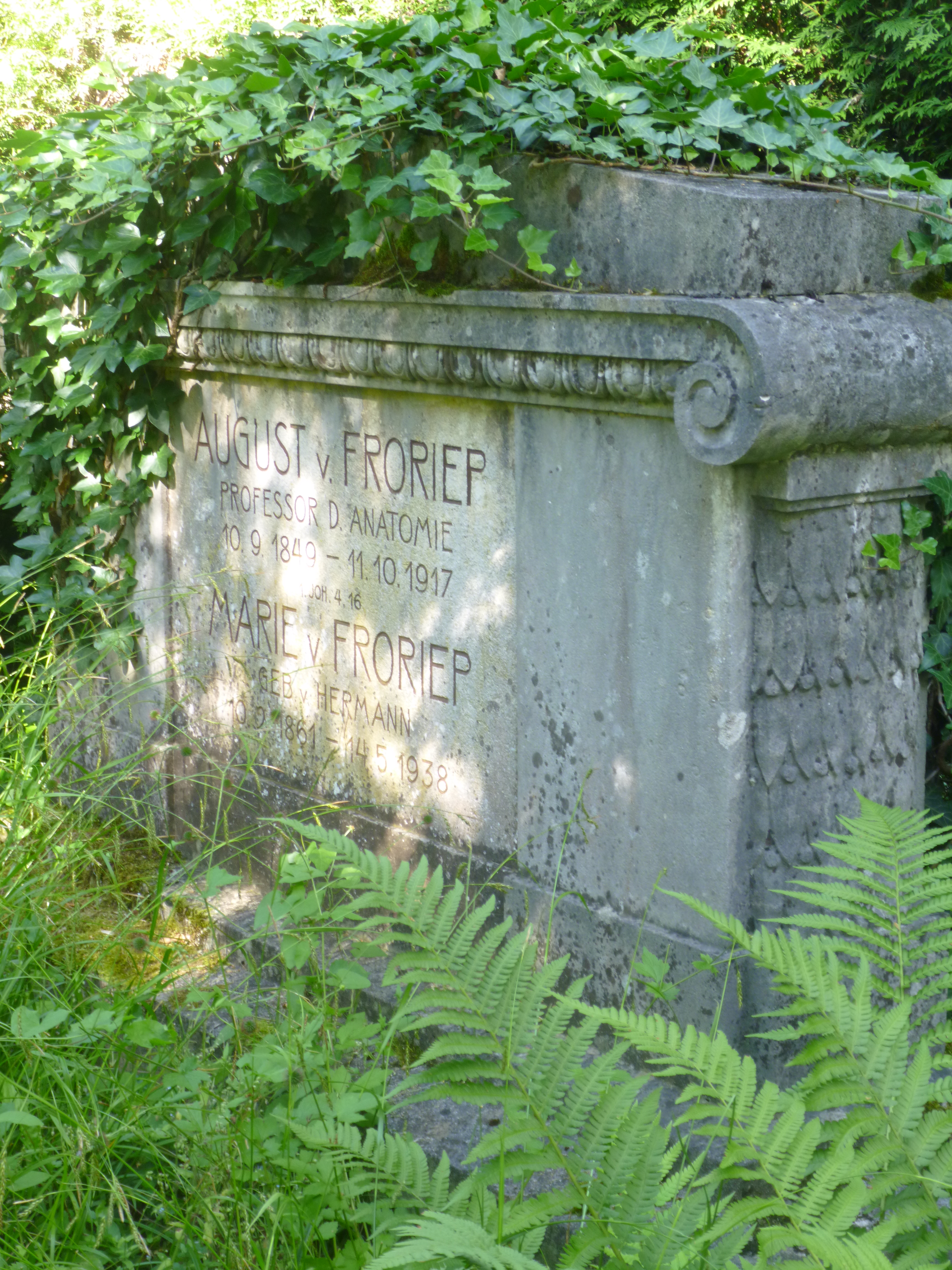 August von Froriep Stadtfriedhof Tübingen